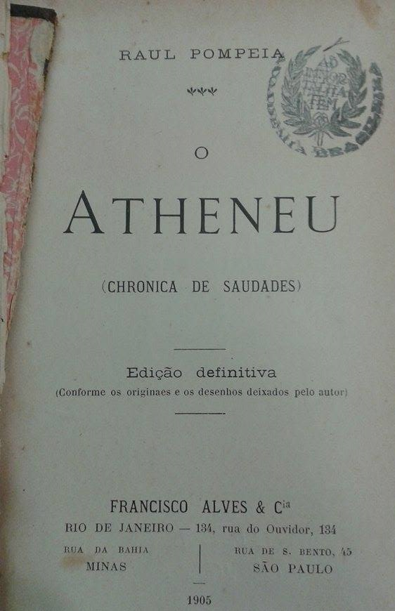 frontispício